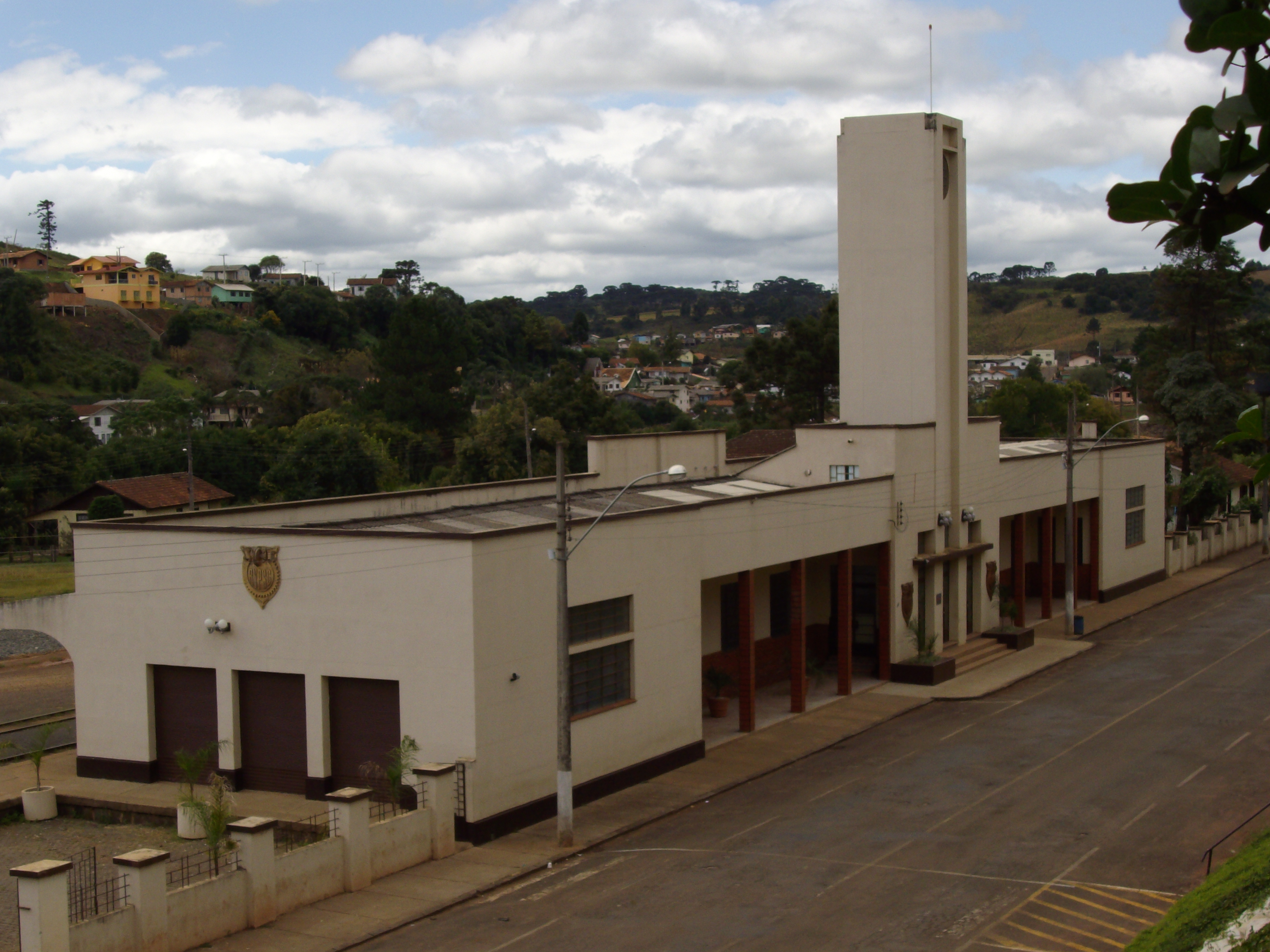 Estação Ferroviária de Caçador - Desativada